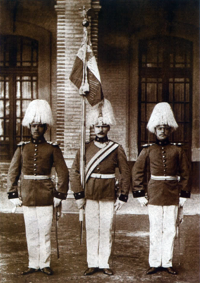 Abanderado y escoltas de la Escuela Militar Bernardo O´higgins. Chile, 1903.